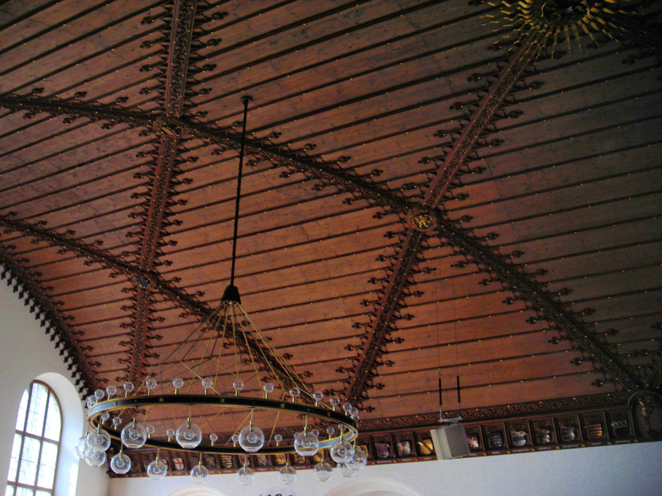 Altes Rathaus (München), Großer Saal, Ostseite